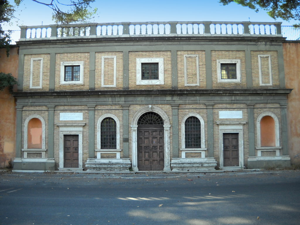 Roma, prospetto della Casa di Michelangelo originariamente situata in via delle Tre Pile, sotto Campidoglio. L'edificio fu demolito nel 1930, e il prospetto ricostruito qui, sul Gianicolo. L'edificio è sede del Centro idrico del Gianicolo, costruito negli anni 1938 - 1940, primo serbatoio della rete idrica potabile di Roma [1].